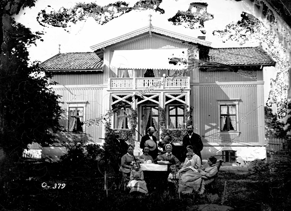 Sveitservilla som stod i Professor Dahls gate 25 før dagens boligblokk. Foto:; Ole Tobias Olsen (ca. 1863–83). Fra Byhistorisk samling hos Oslo Museum.